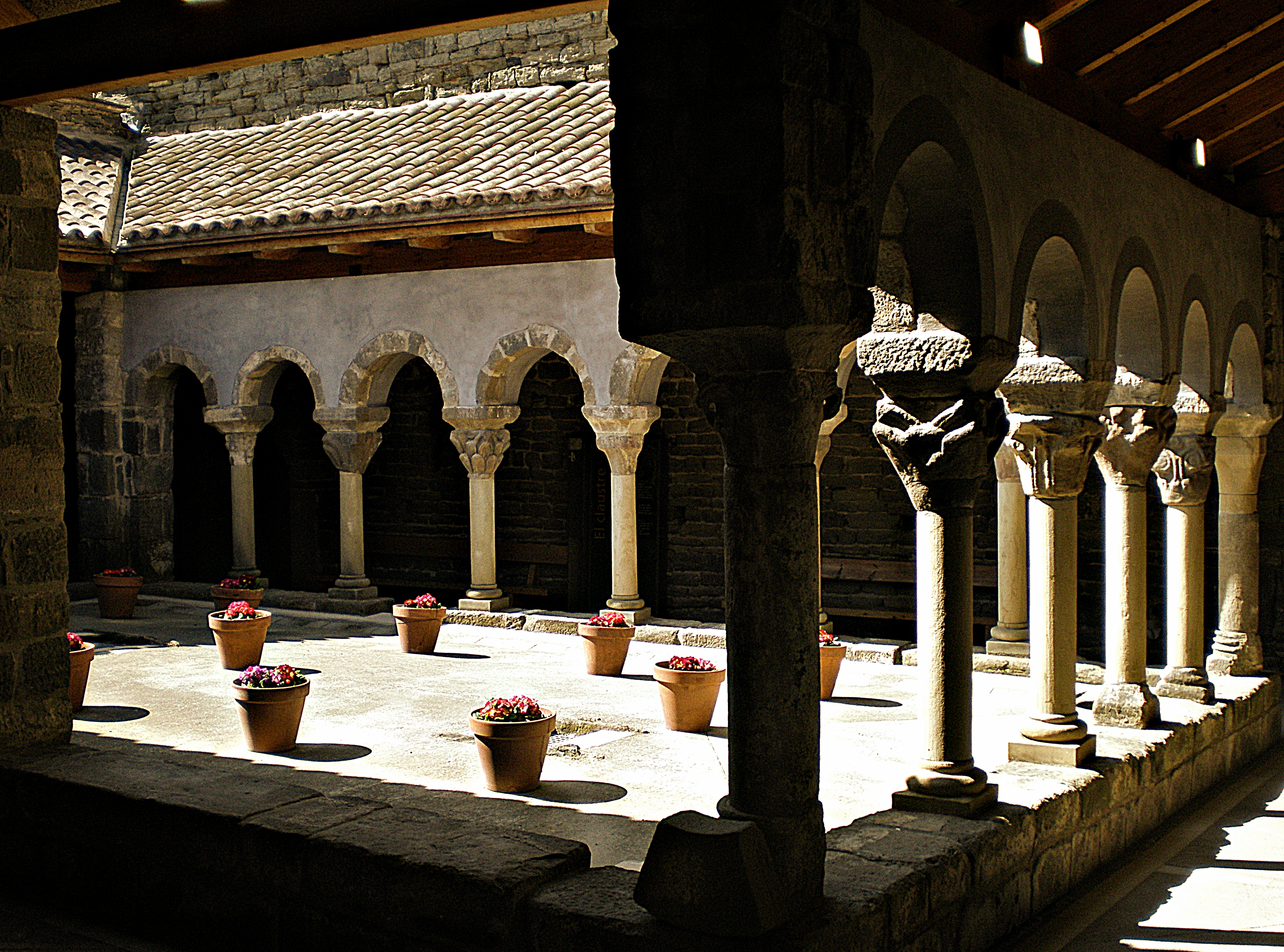 Monestir de Sant Pere de Casserres (Les Masies de Roda)